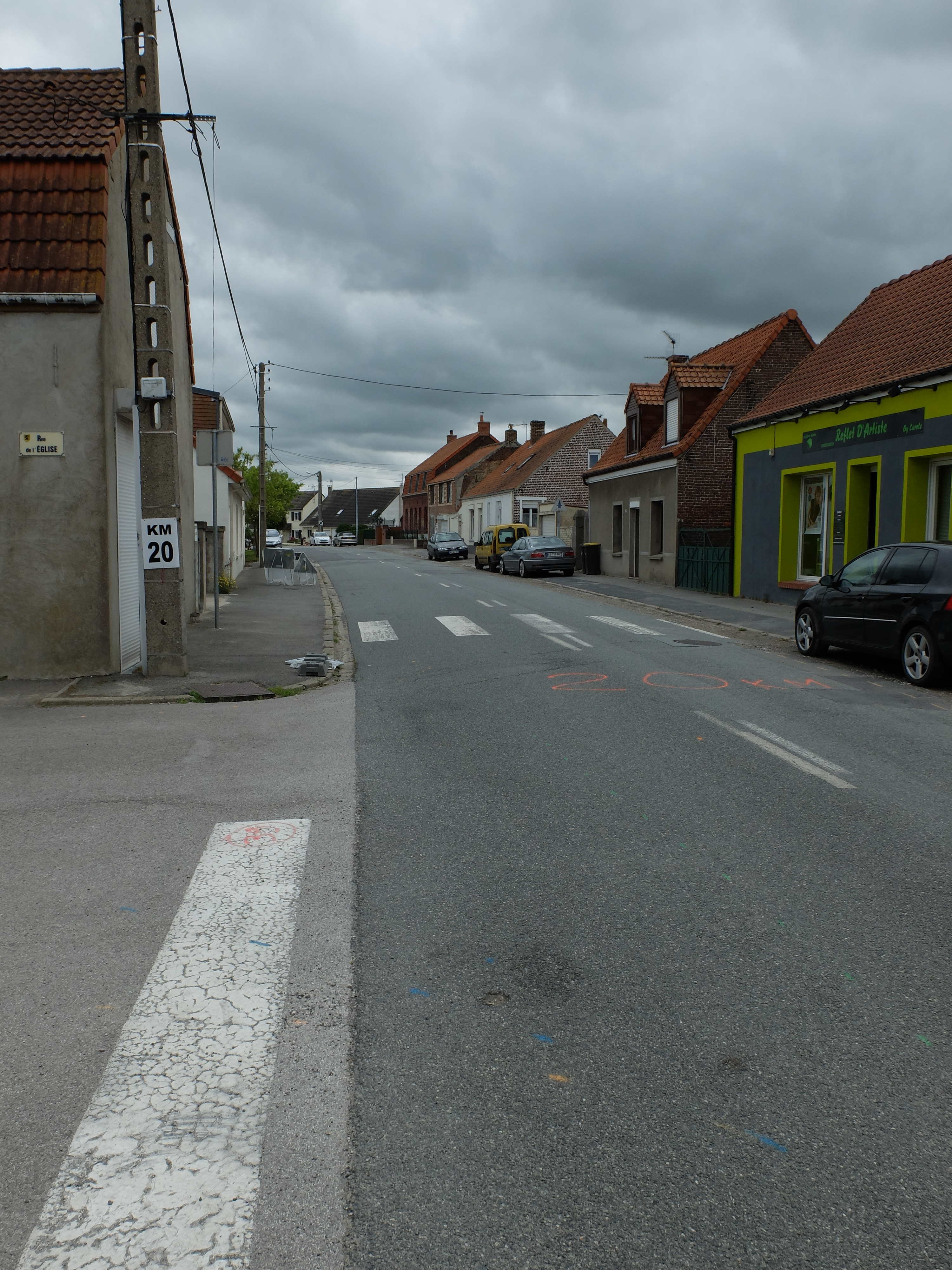 Vue de la route de Bourbourg d'Holque.